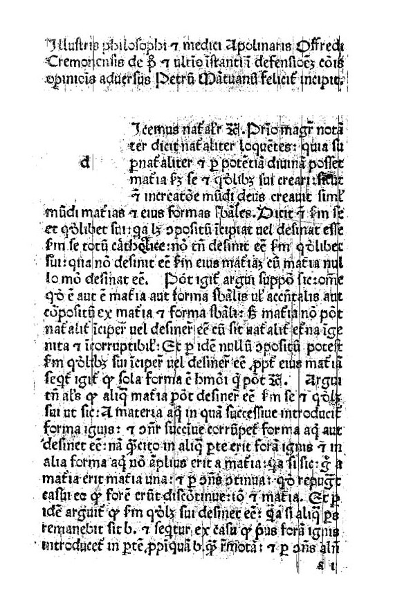 Illustris philosophi & medici Apolinaris Offredi ... De p[rim]o et ulti[m]o i[n]stanti i[n] defensione[m] co[mm]u[n]is opinio[n]is aduersus Petrum Mantuanum feliciter incipit. - [S.l.] : M[a]g[iste]r Bonus Gallus i[m]pressit i[n] oppido Colle[n]si ma[n]cipio florentino, anno d[omi]ni 1478. - 44 c. ; 4º. - ISTC io00060000; GW M27721. - Segn.: a-d8 e12 .